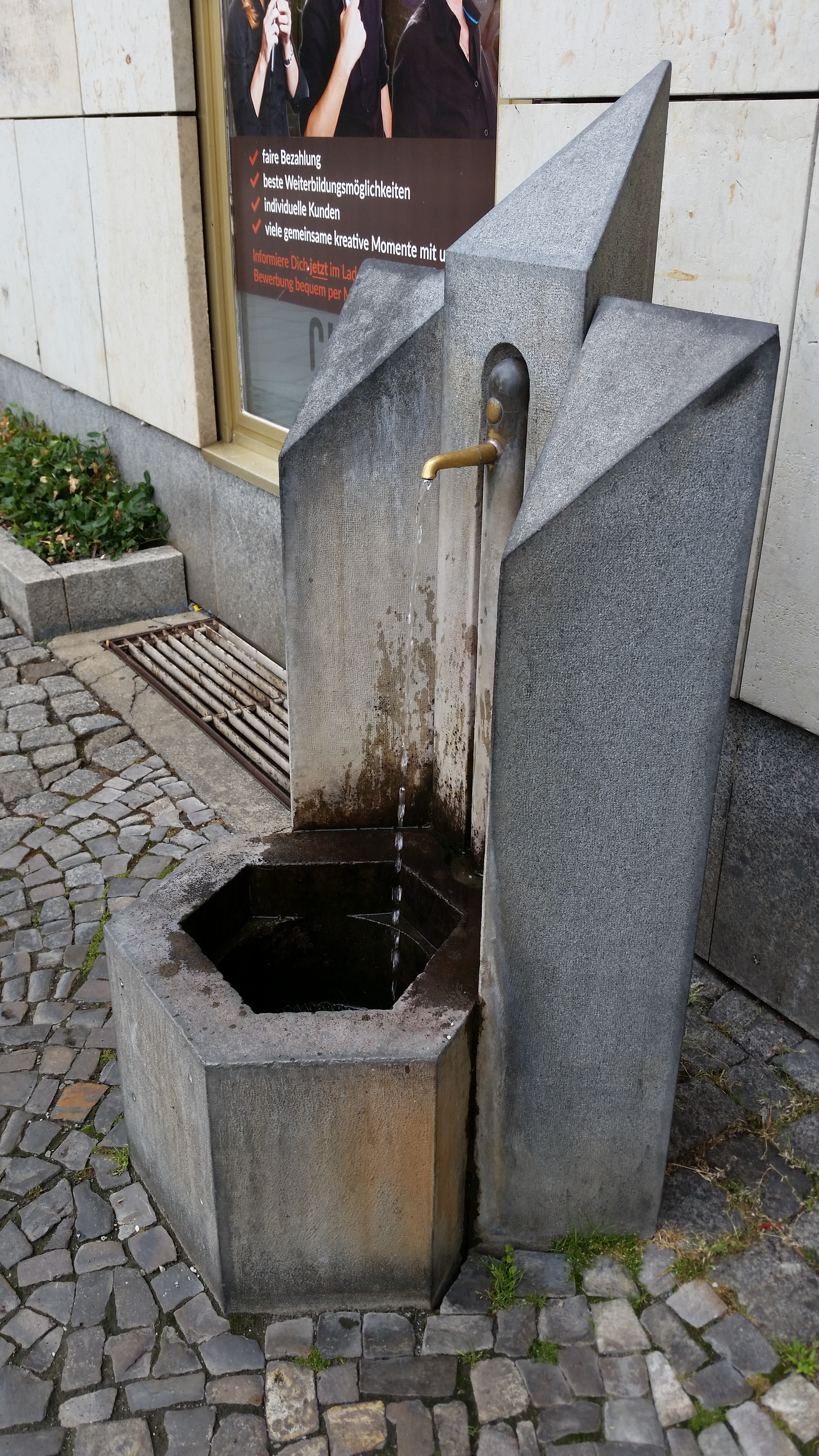 Das Brunnenwasser fließt seit 1836 aus 240 Meter Tiefe durch natürlichen Druck an die Oberfläche. Neben der Fontäne unter der kleinen Tempelanlage (ein Rundbau mit Goldfischbecken von 1906) gibt es eine Zapfstelle (1990 nach einem Entwurf von Rolf Roeder errichtet).